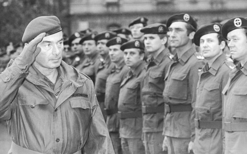 ADN-Friedrich Gahlbeck-4.10.90 Leipzig: Befehlsübernahme. Einen Tag nach der deutschen Wiedervereinigung übernahm Generalleutnant Jörg Schönbohm, Befehlshaber des Bundeswehrkommandos Ost, das Wehrbereichskommando VII der Bundeswehr, vormals Wehrbezirk III der Nationalen Volksarmee.